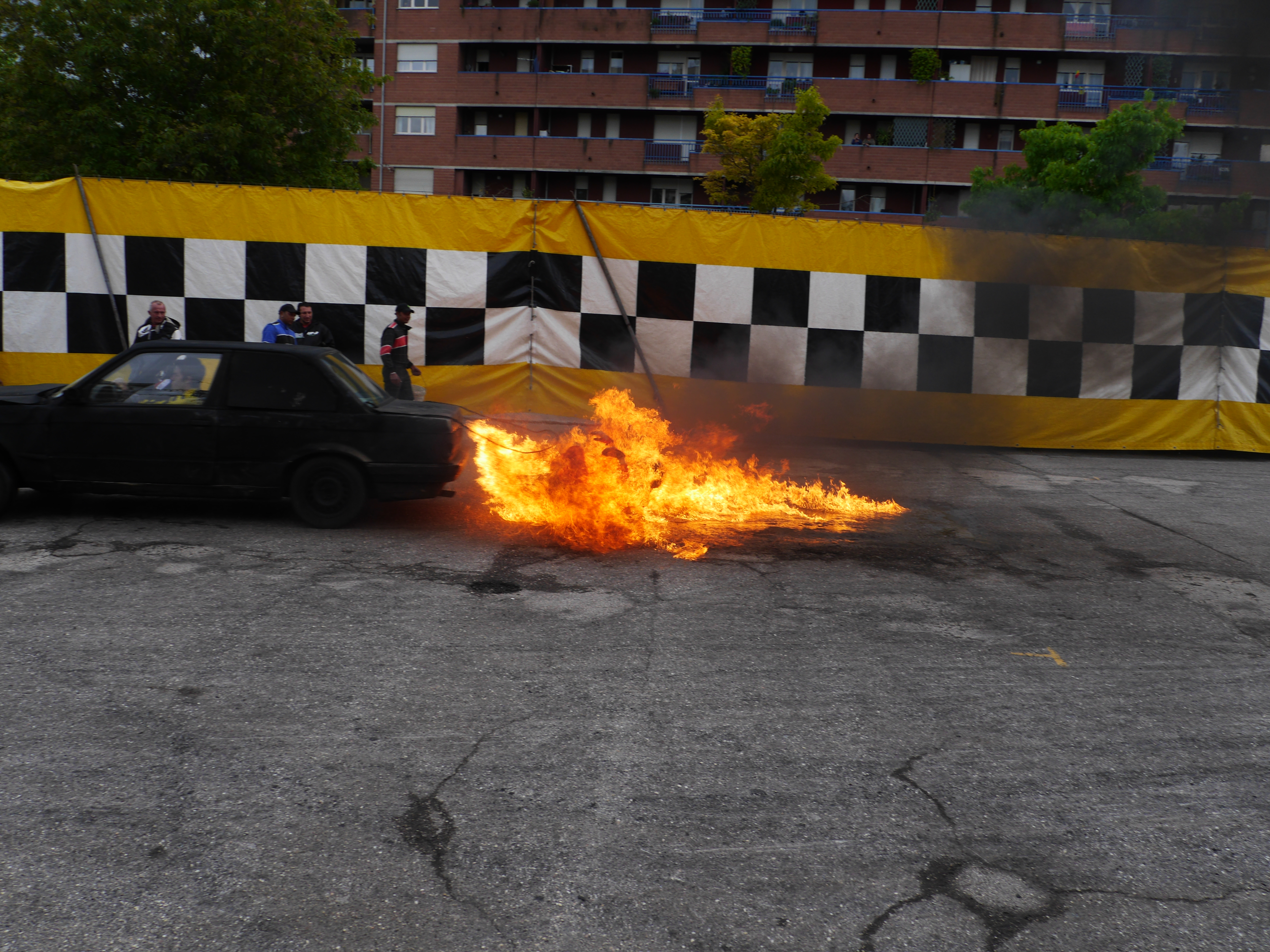 This photo was taken with Panasonic Lumix DMC-GH3 camera, thanks to Panasonic. You can see all photographs in category: Taken with Panasonic Lumix DMC-GH3.